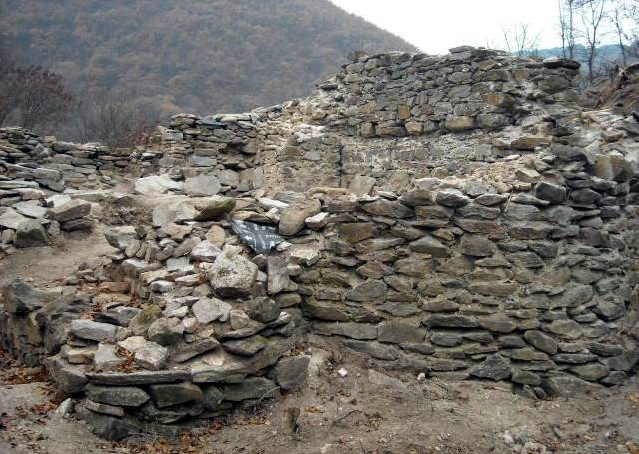 Останки от крепостната черква "Св. Илия" в крепостта "Урвич"